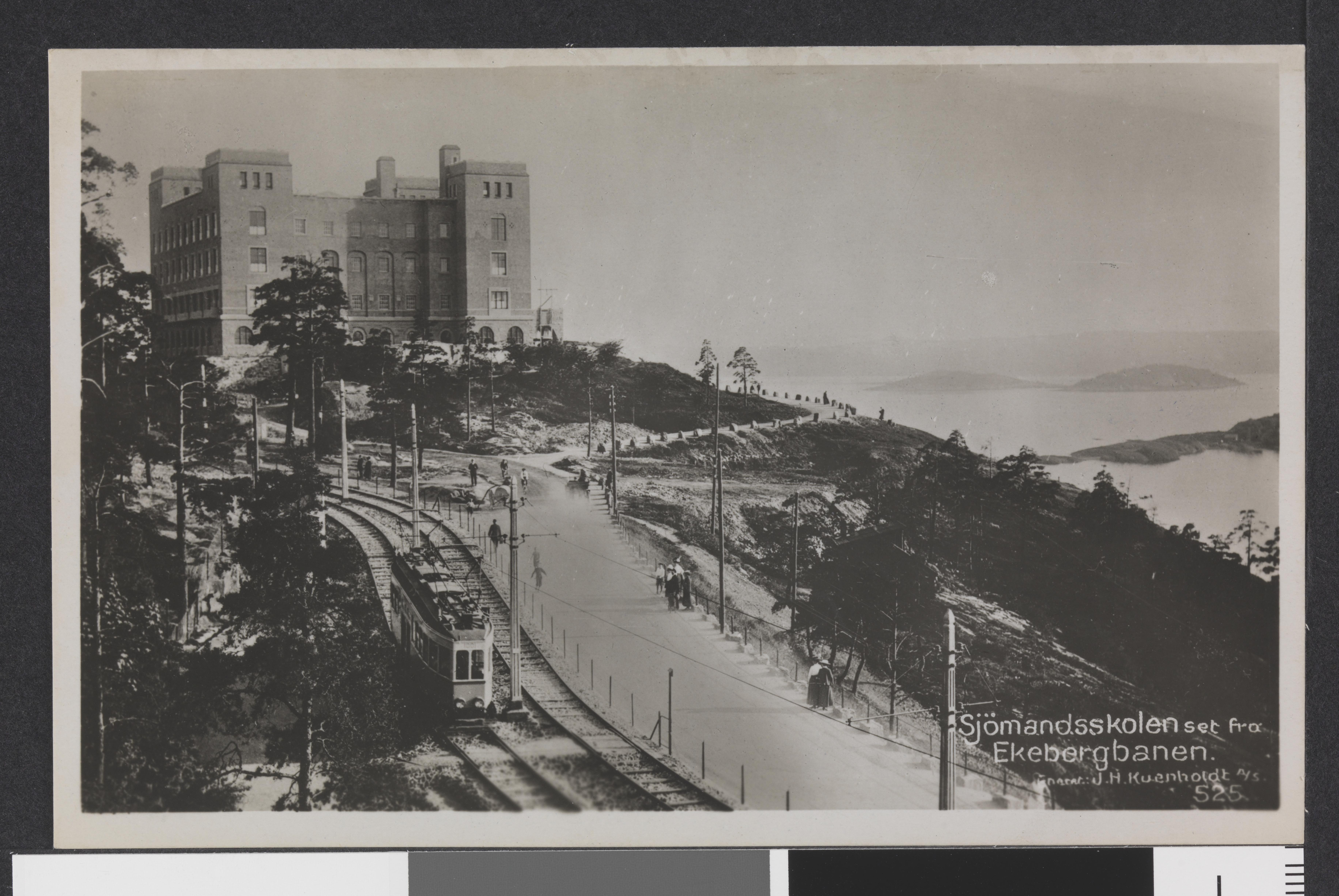 Bildet er hentet fra Nasjonalbibliotekets bildesamling Ekeberg, Oslo, Oslo